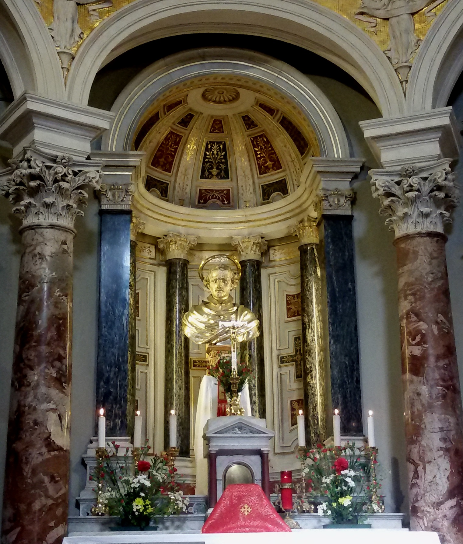 Intérieur de l'église Saint-Yves-des-Bretons (Sant'Ivo dei Bretoni), église nationale des Bretons à Rome.